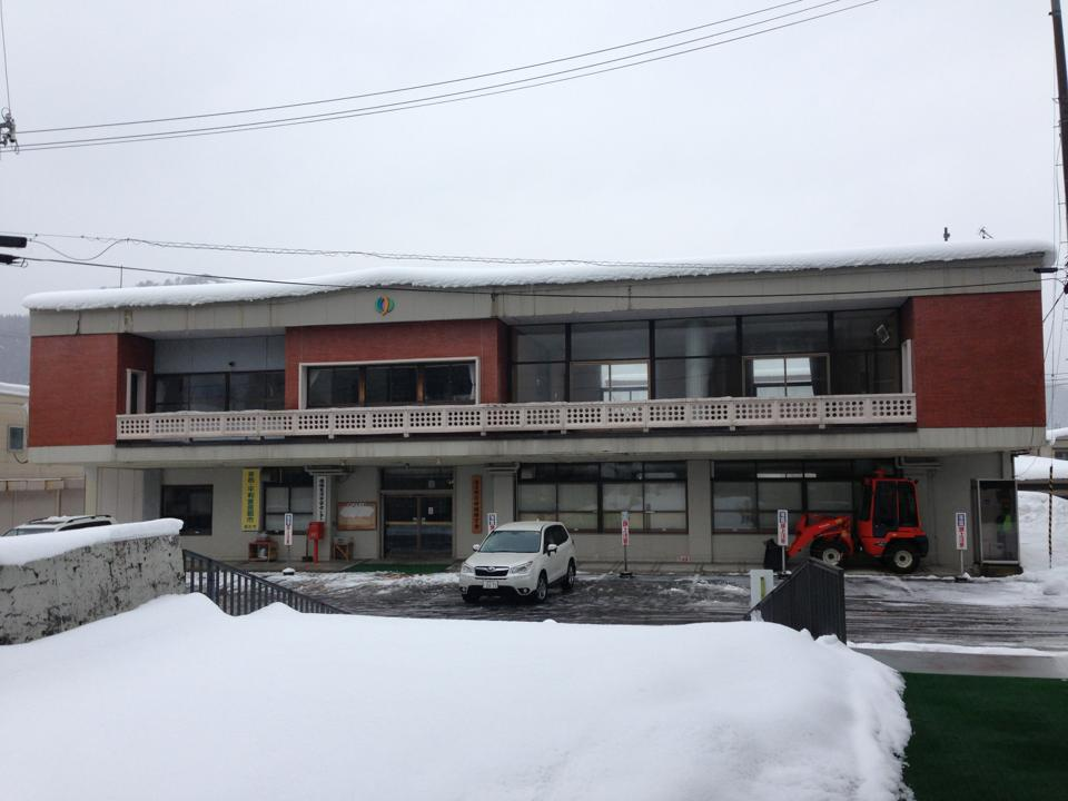 白井晟一の建築